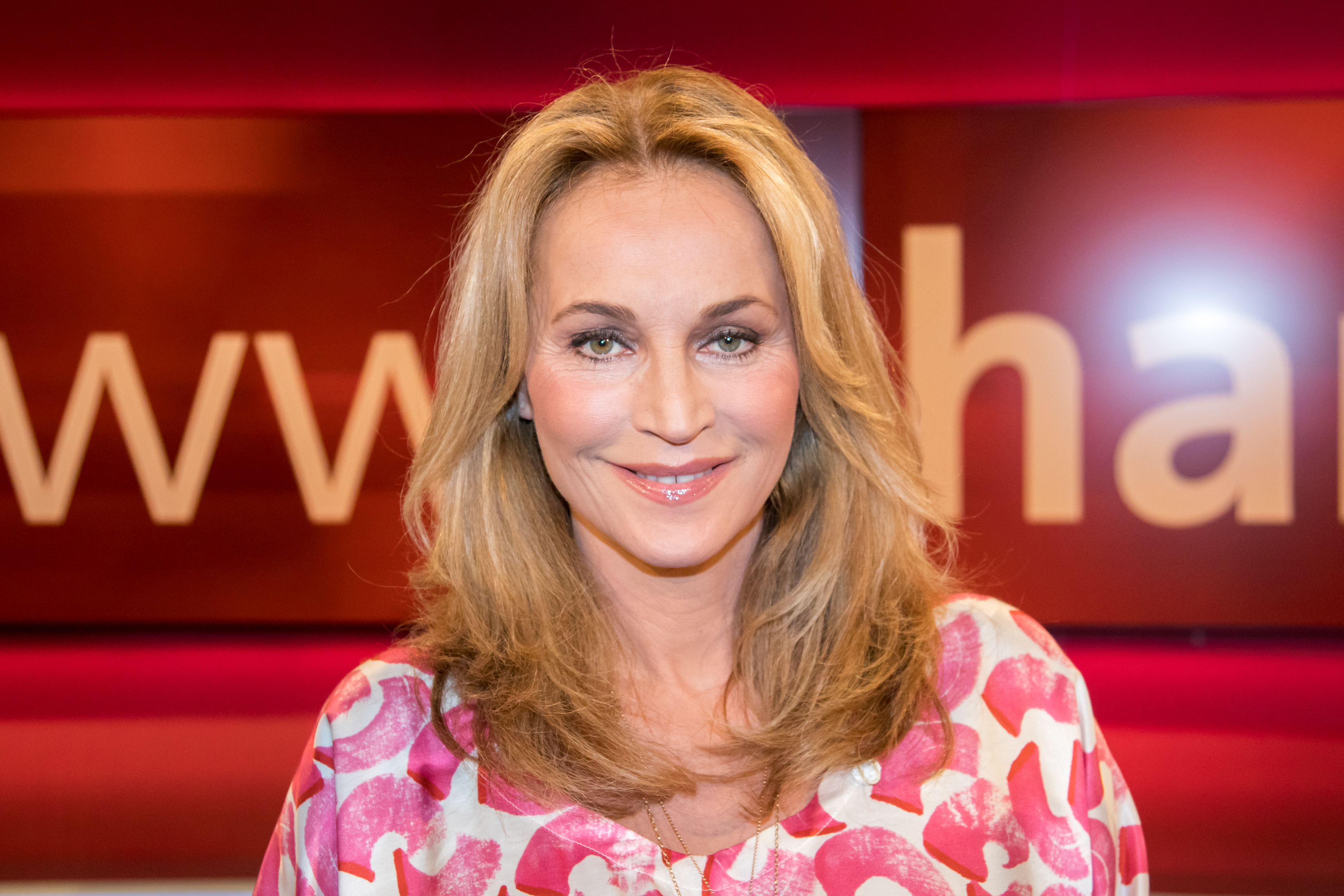 in der WDR-Sendung "hart aber fair" am 20. März 2017